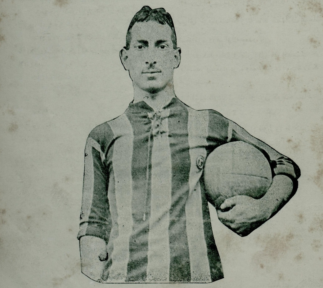 1 Mayıs 1914 tarihli İdman mecmuasında Galip (Kulaksızoğlu) Bey'in Fotoğrafı. Formanın göğsünde Fenerbahçe'nin ilk arması olan ışık saçan Fener var.